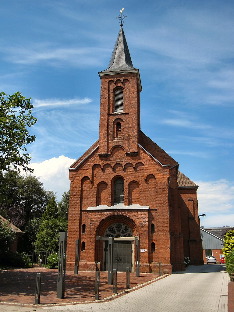 Katholische St. Ludgerus Kirche in Norden (Ostfriesland)